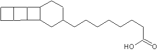 Химическая формула жирной карболовой кислоты